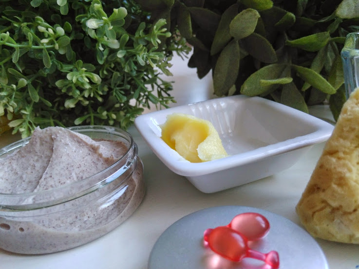 Para la elavoración de cosméticos naturales no se utilizan químicos.